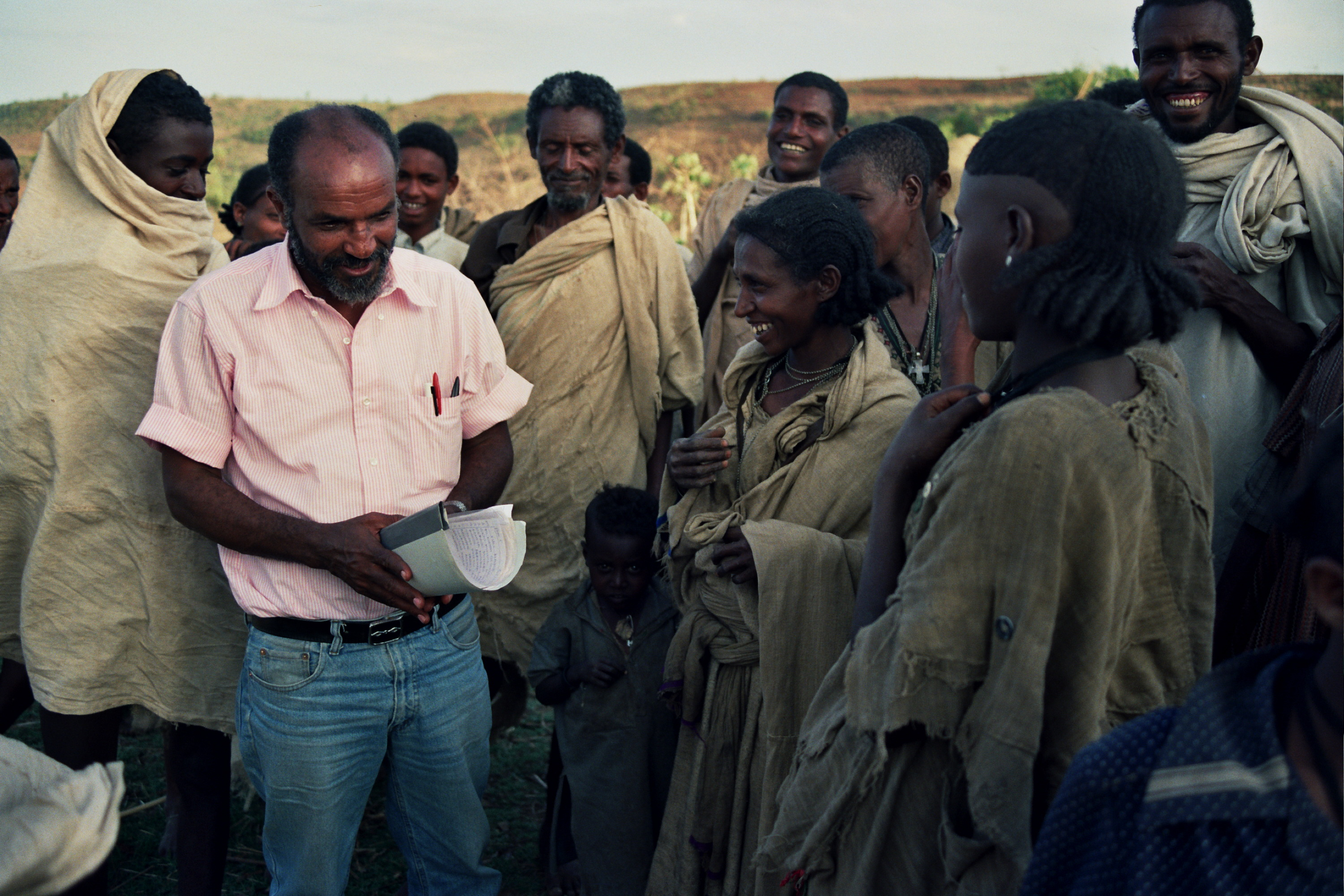 זימנה ברהני באתיופיה, 1992